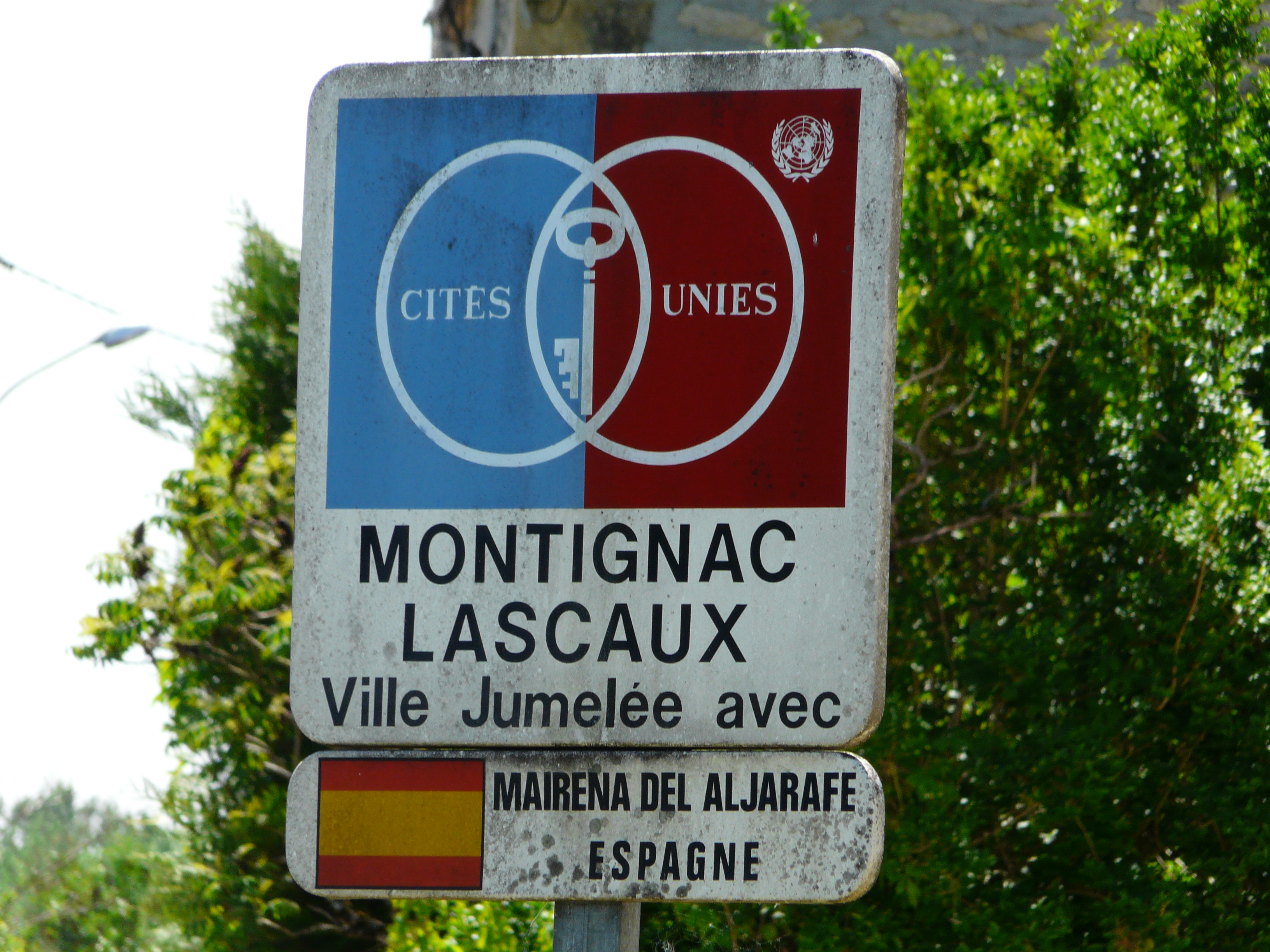 Panneau de jumelage à Montignac, Dordogne, France.